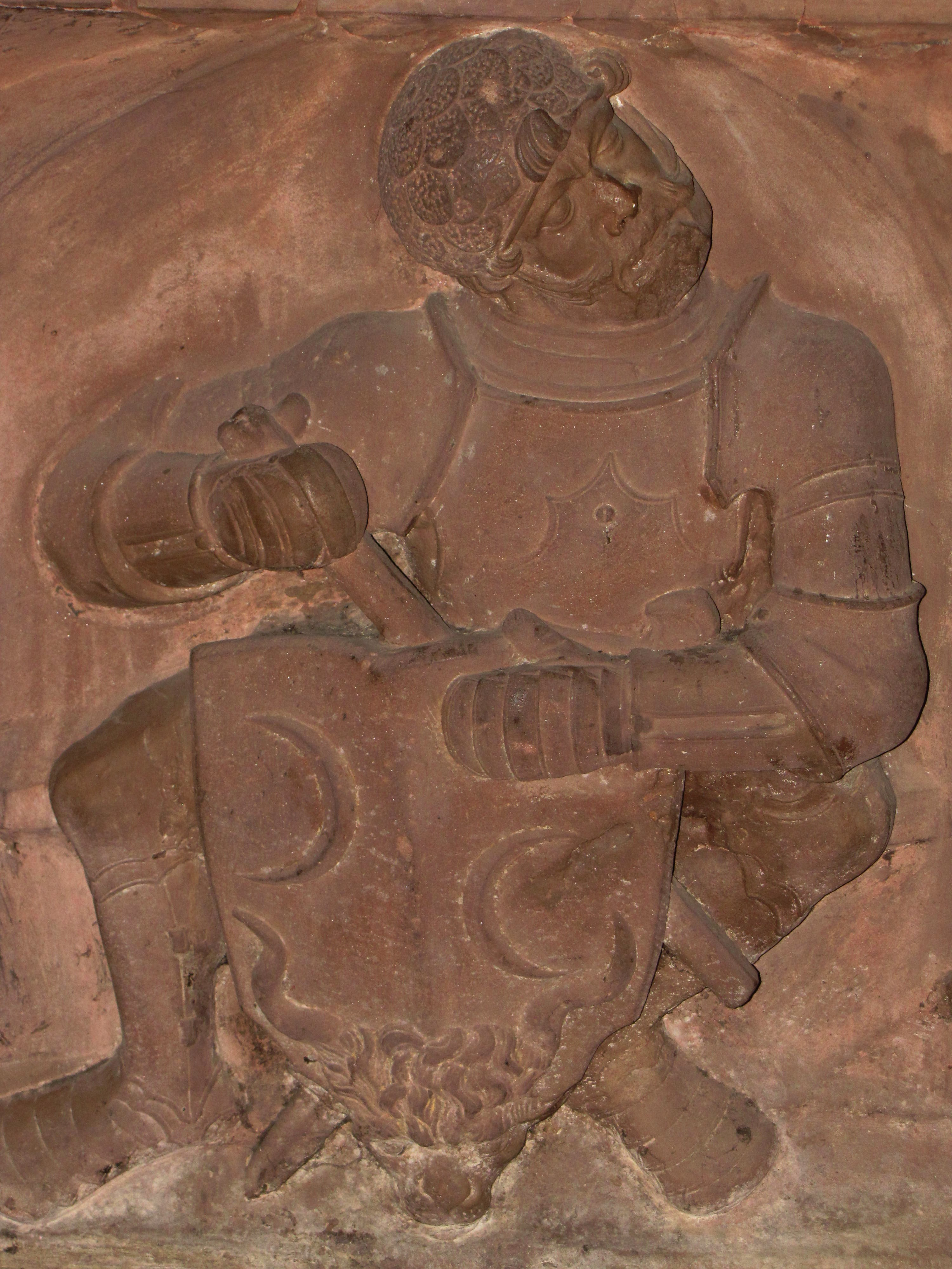 Alsace, Bas-Rhin, Haguenau, Basilique Notre-Dame-des-Douleurs de Marienthal (ancien Prieuré des Guillemites) (IA00062022). Saint Sépulcre (vers 1519): Soldat accroupi sous le Saint Sépulcre. This object is classé Monument Historique in the base Palissy, database of the French furniture patrimony of the French ministry of culture, under the references PM67000601 and IM67002229.